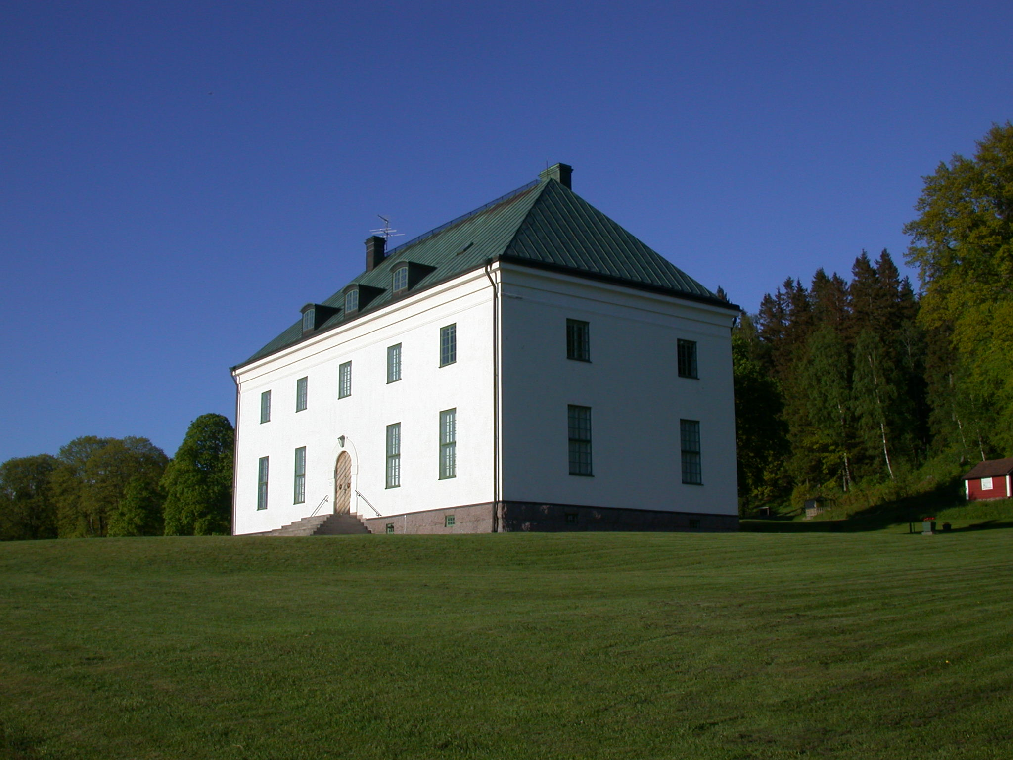 Övralid, Nysätter, Sweden. House of Verner von Heidenstam. Photo by Riggwelter June 1, 2006.